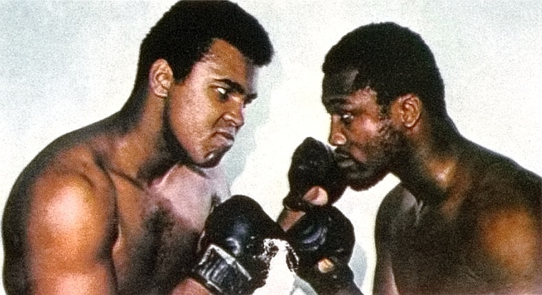 Cassius Clay y Joe Frazier - El Grafico del 08 de Enero de 1974. Edicion 2831